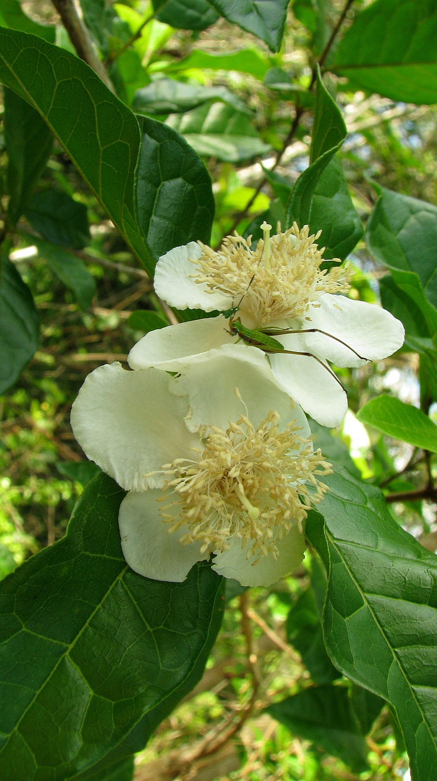 Campomanesia viatoris Landrum